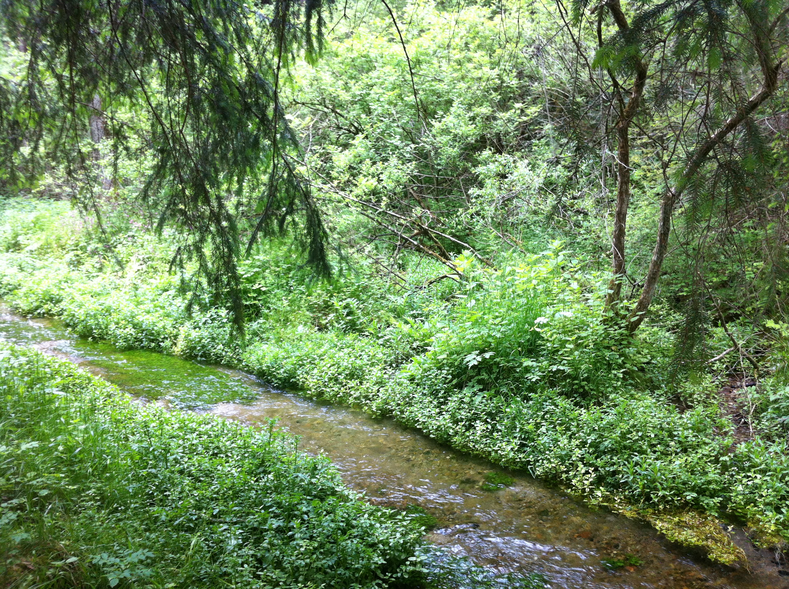 Im Quellgebiet der Schönach (Lech)